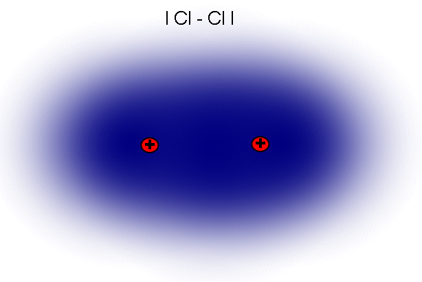 Bildbeschreibung: Unpolare Atombindung am Beispiel Cl-Cl Fotograf/Zeichner: H. Hoffmeister (erstellt mit Word - wer die Vektorgrafik möchte, kann sich jederzeit melden) Datum: 13.1.2006